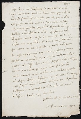 Van Thomas More aan Fr. Cranevelt (KU Leuven Bibliotheken, Bijzondere Collecties, LCB Ep. 116)